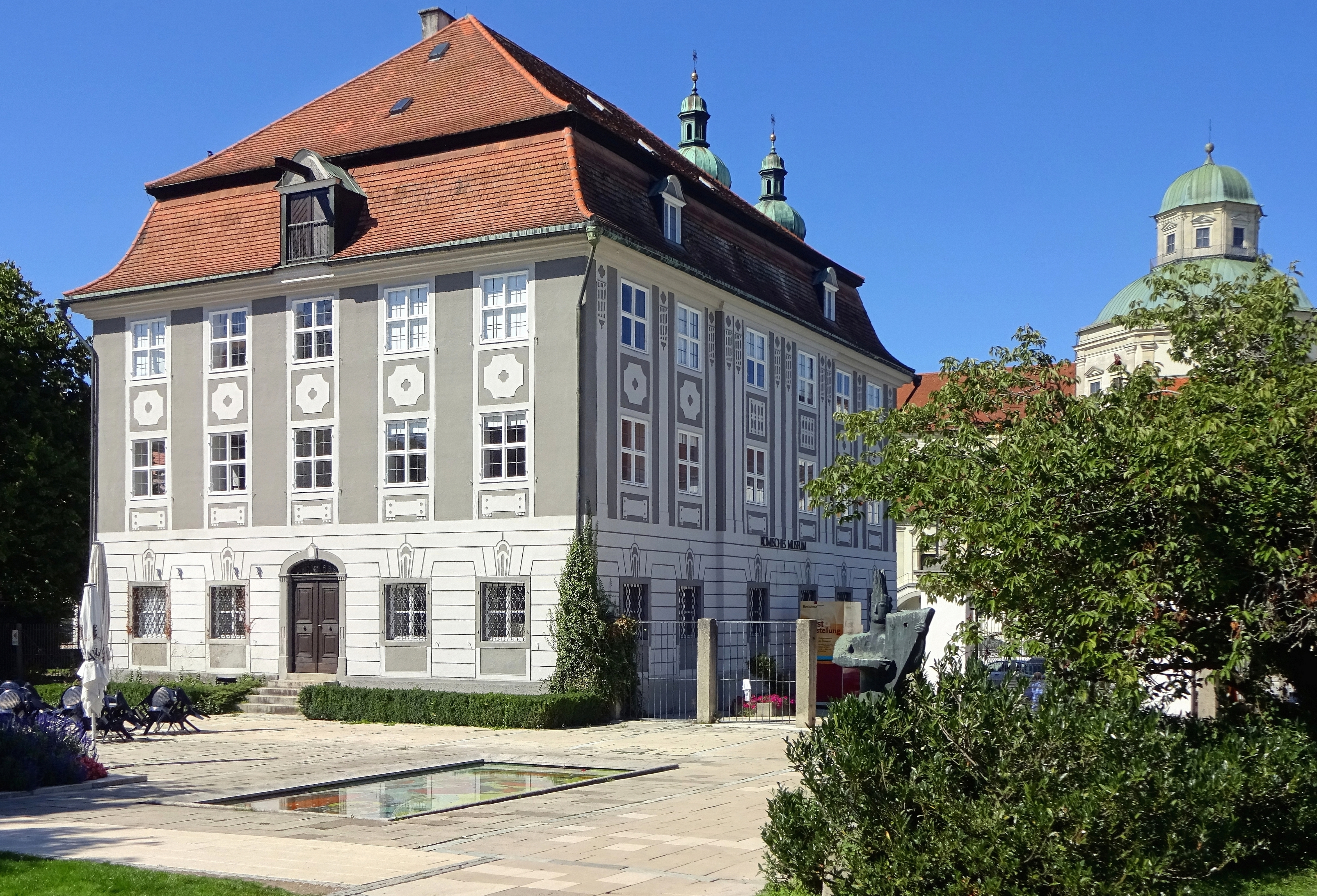 August 2015